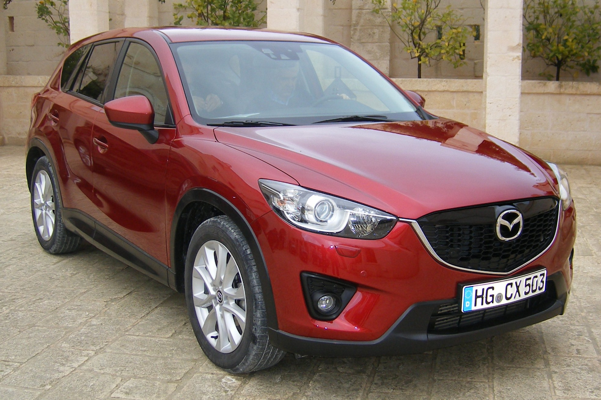 Mazda CX-5